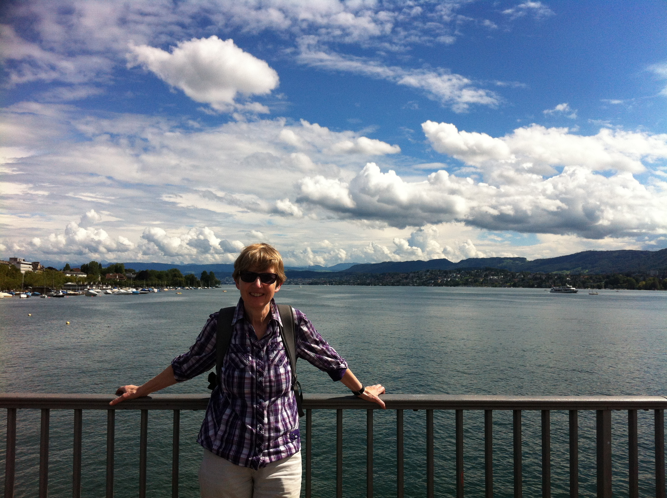 Claudia Schoppmann, am Zürichsee, 2014